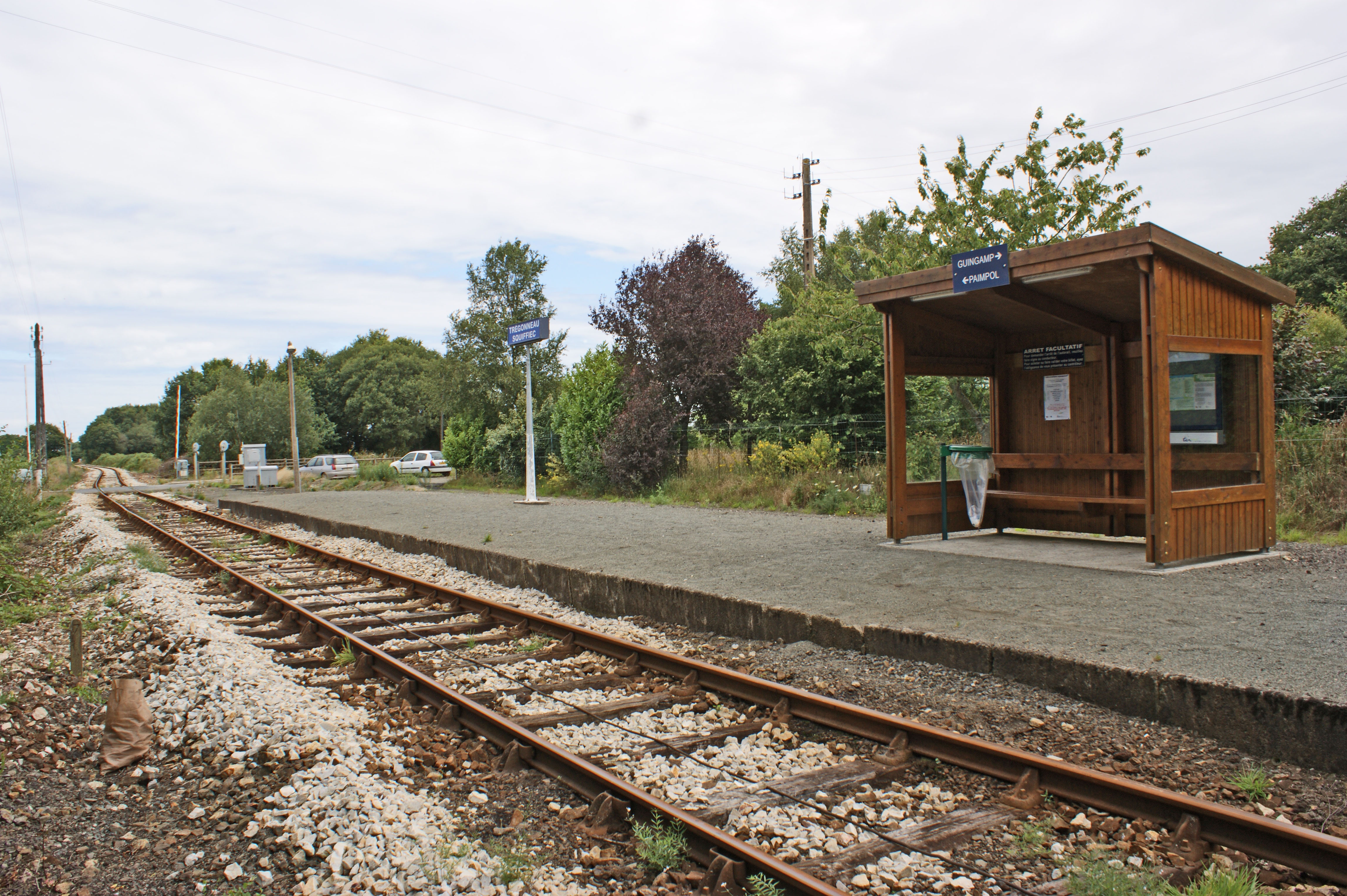 La gare de Trégonneau - Squiffiec devenue halte TER, avec sa voie, son quai et son abri.